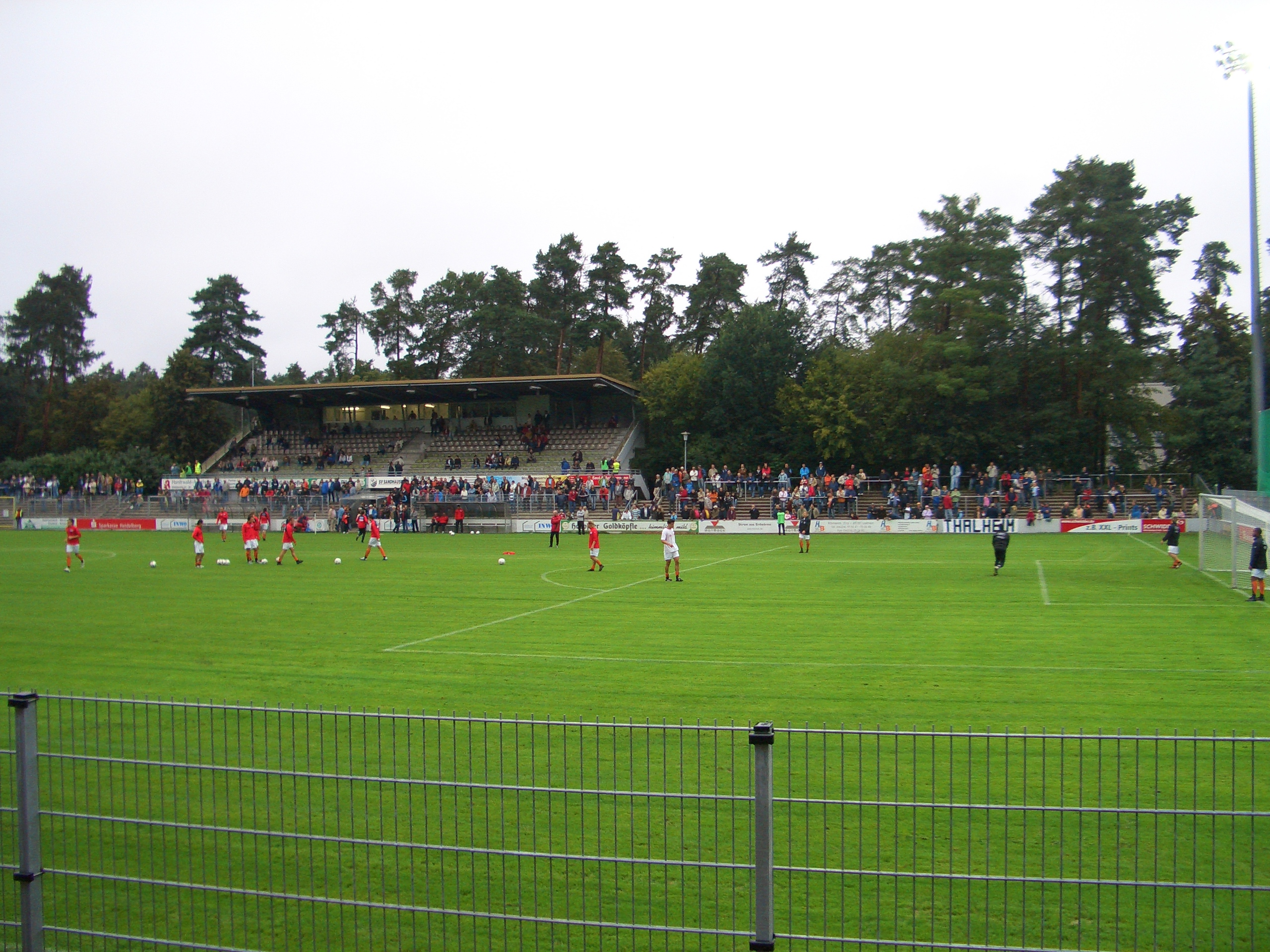 Hardtwaldstadion, Sandhausen